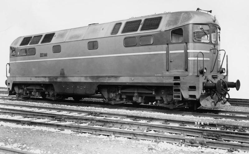 Locomotiva D-342-2001 nella versione di origine, senza terzo faro centrale (foto archivio FS)